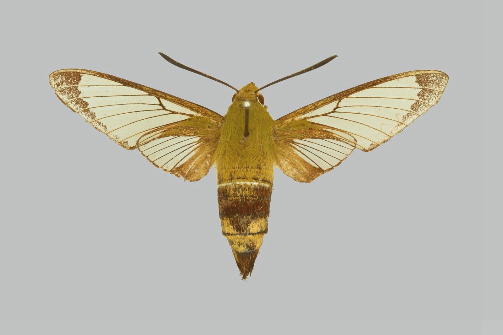 Hemaris saundersii, female, upperside. India, Simla